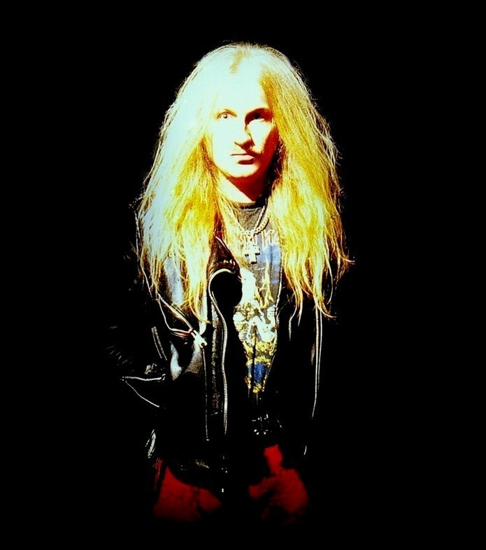 Ricky van Helden